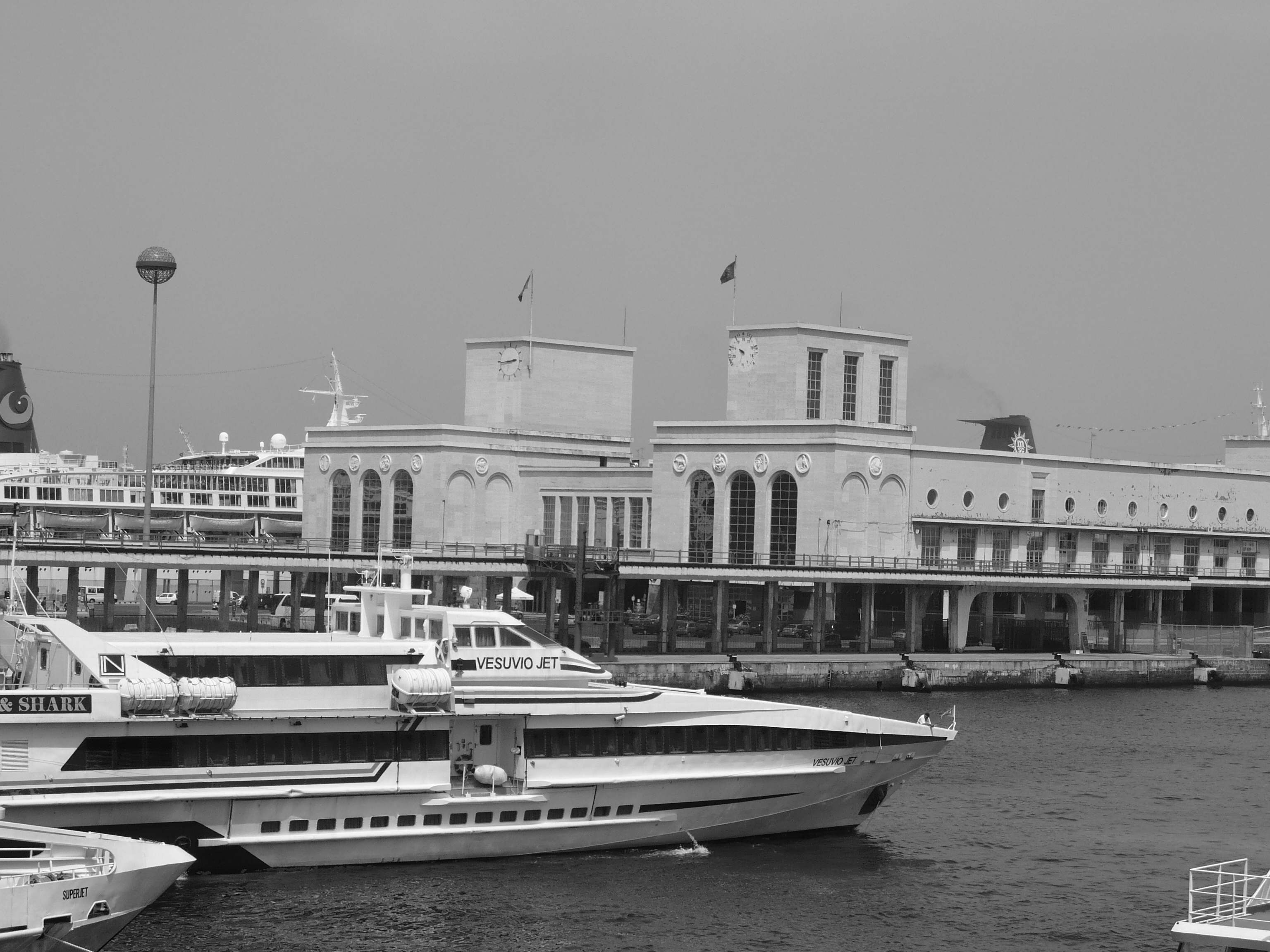 Stazione Marittima del Molo Beverello di Napoli ritratta dal ponte di un traghetto. In primo piano uno degli aliscafi che collegano il Capoluogo con le isole.